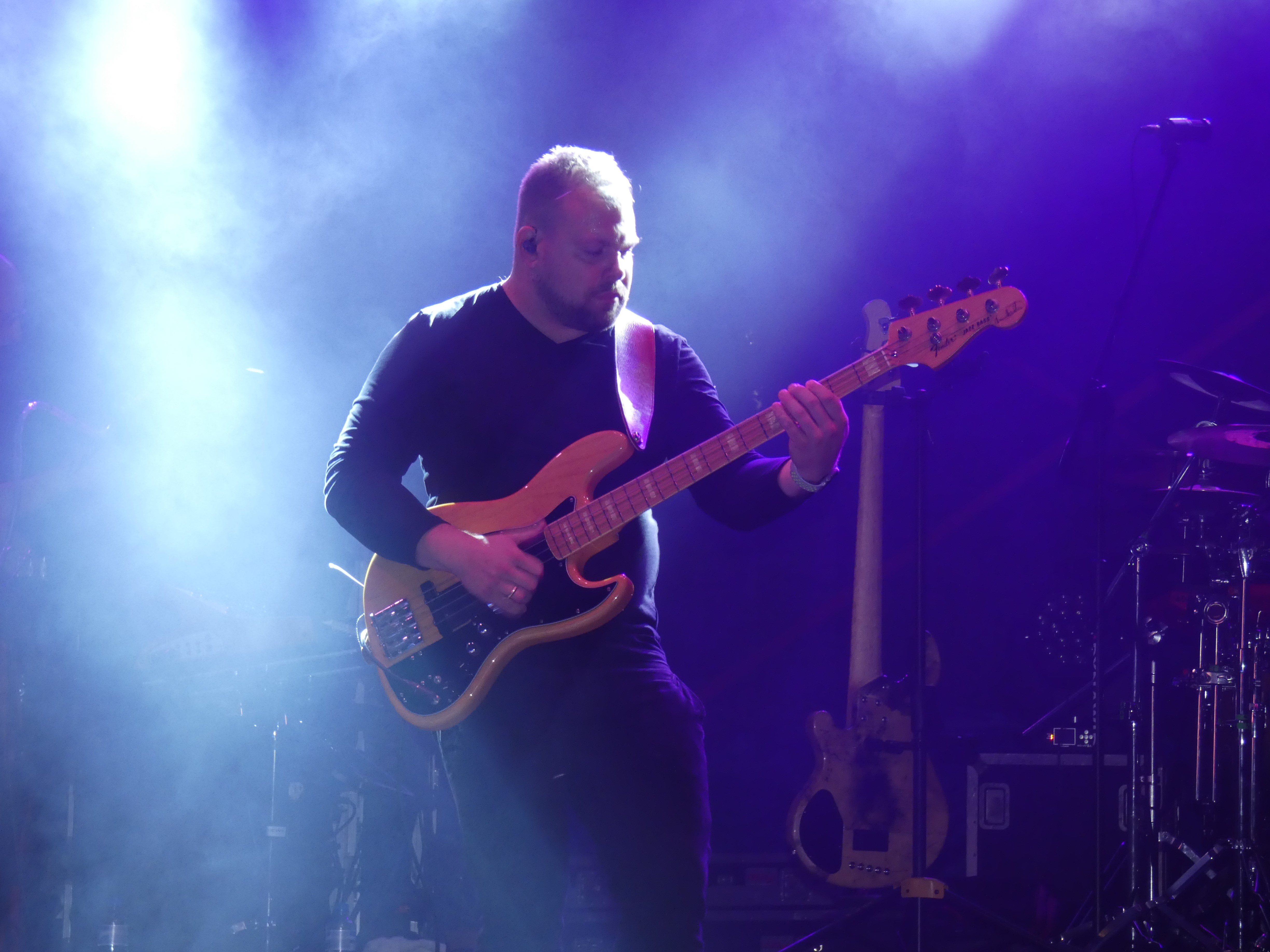 Karol Kozłowski – Kombi, Nowa Dęba 2019-06-16